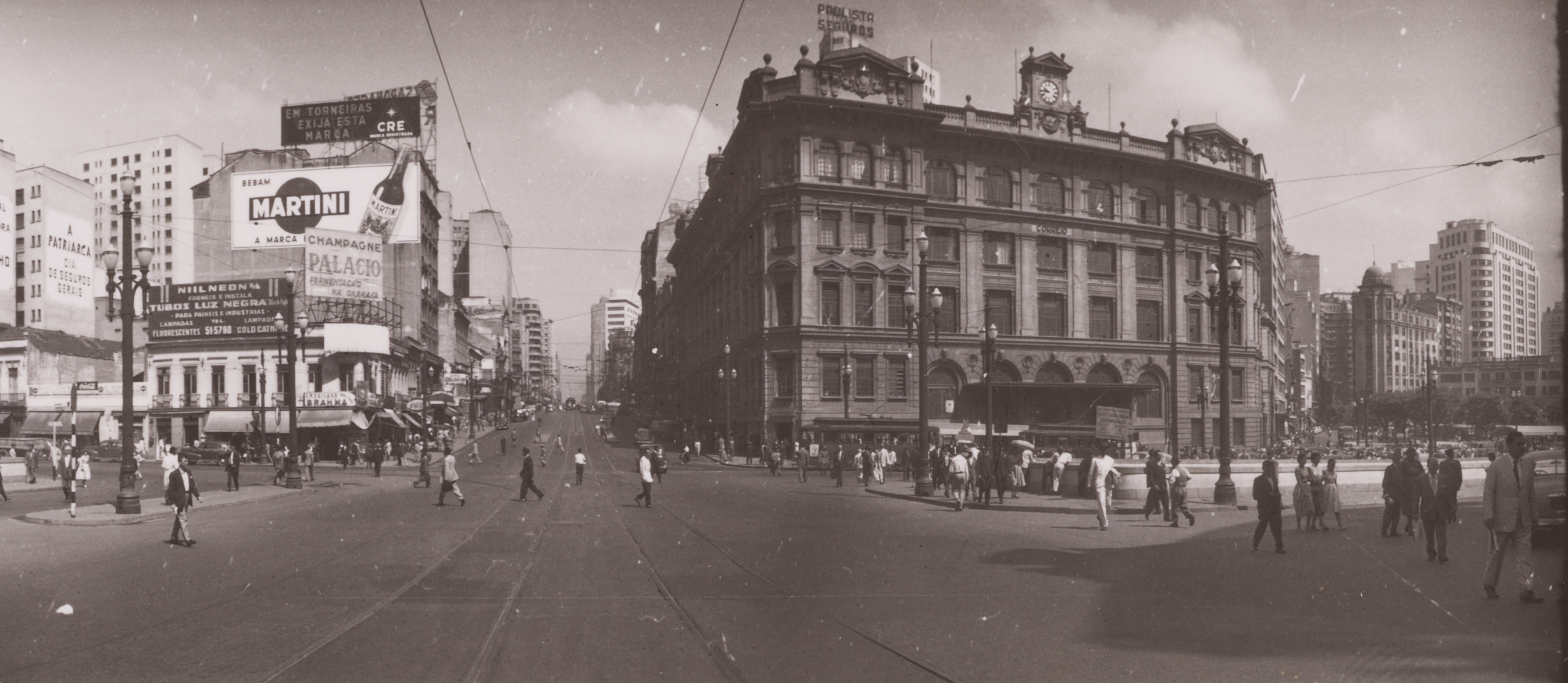 Obra que integra o acervo do Museu Paulista da USP. Coleção Werner Haberkorn - CHW